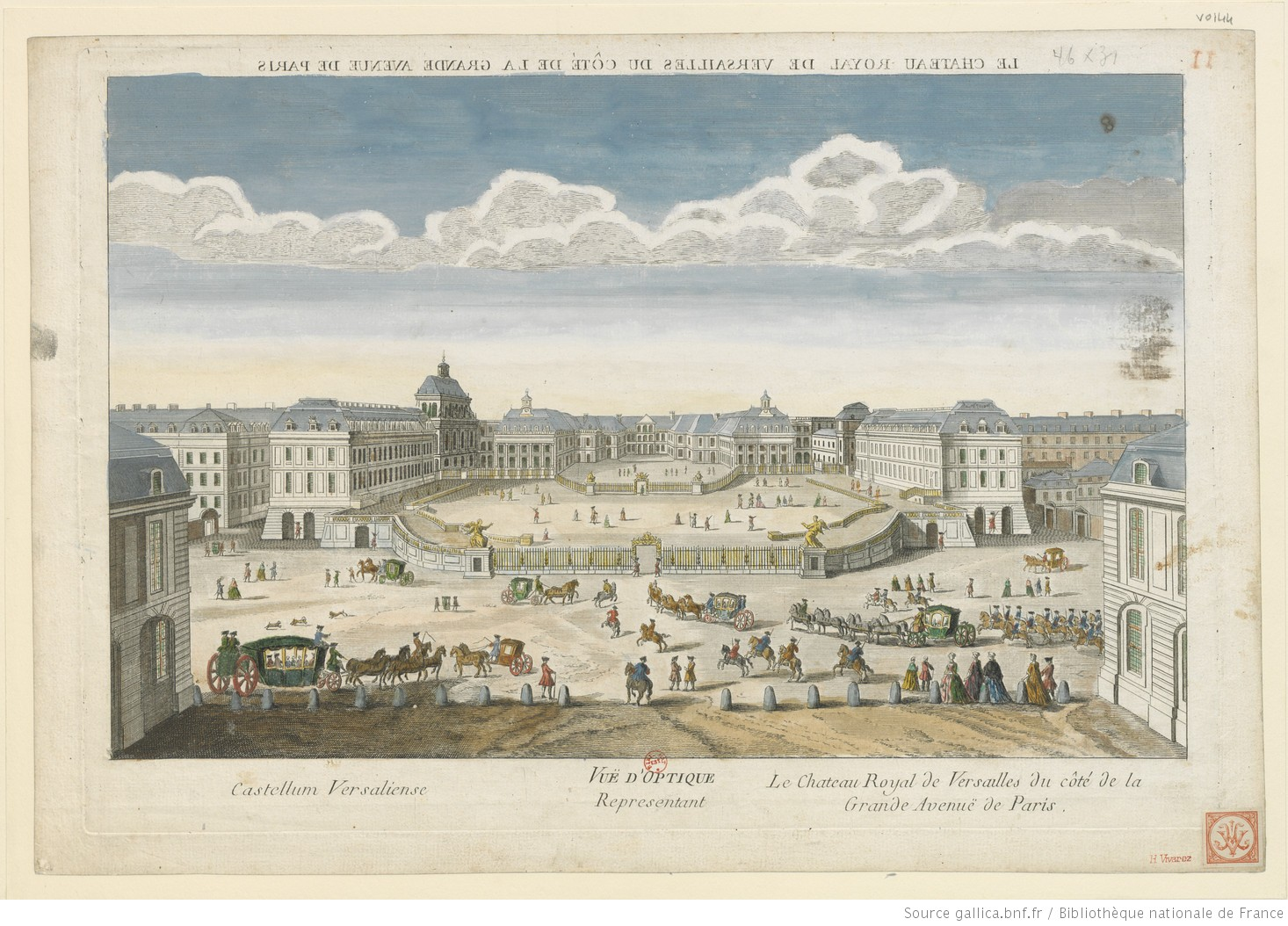 Castellum Versaliense, imago anno 1750 confecta